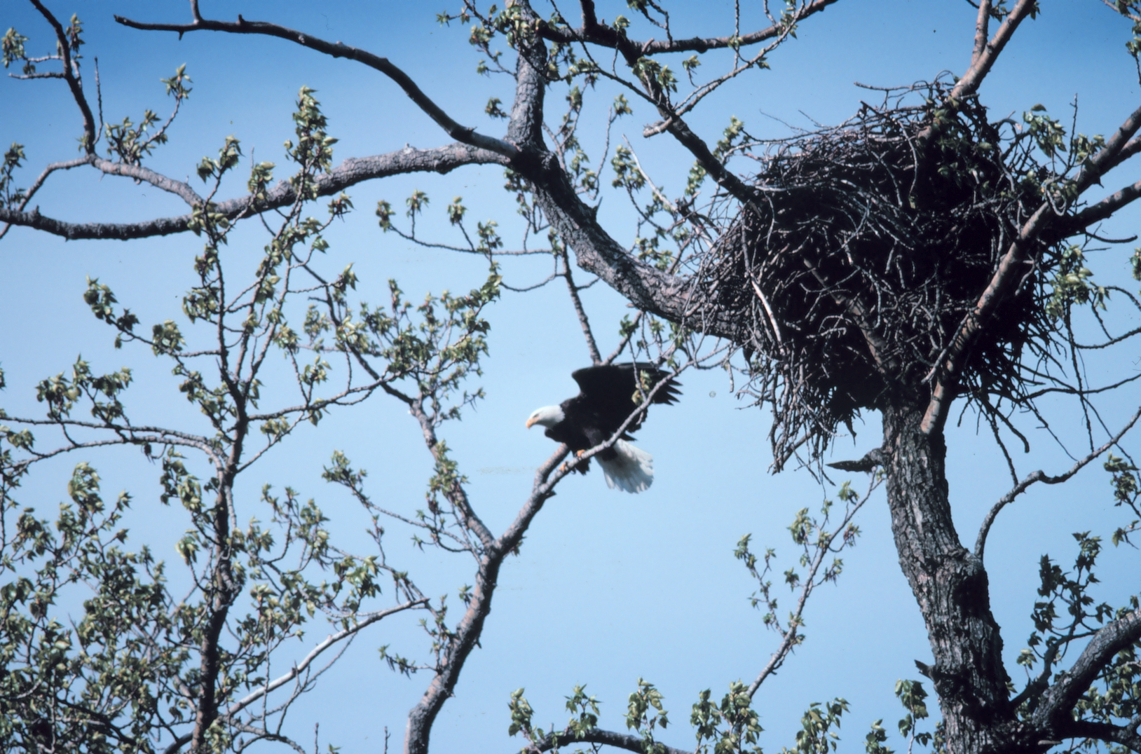 Bald Eagle - Haliaeetus leucocephalus